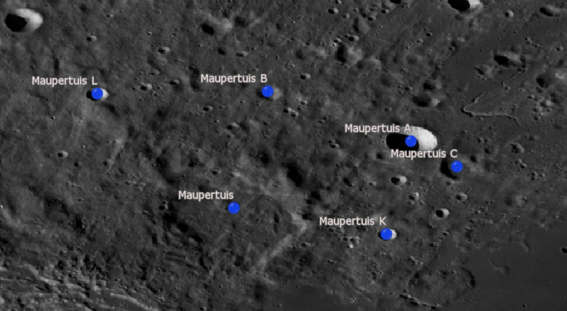 Cráter lunar Maupertuis. Cráteres satélite. (Imagen LRO)